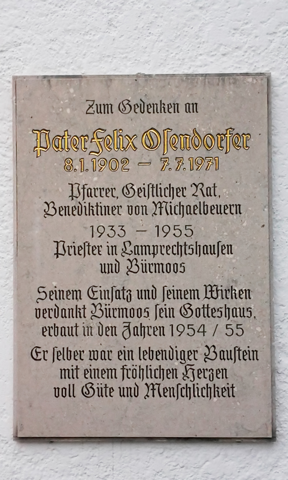 Gedenktafel an Pater Felix Osendorfer, dem Begründer der Bürmooser Pfarrkirche, dortselbst angebracht